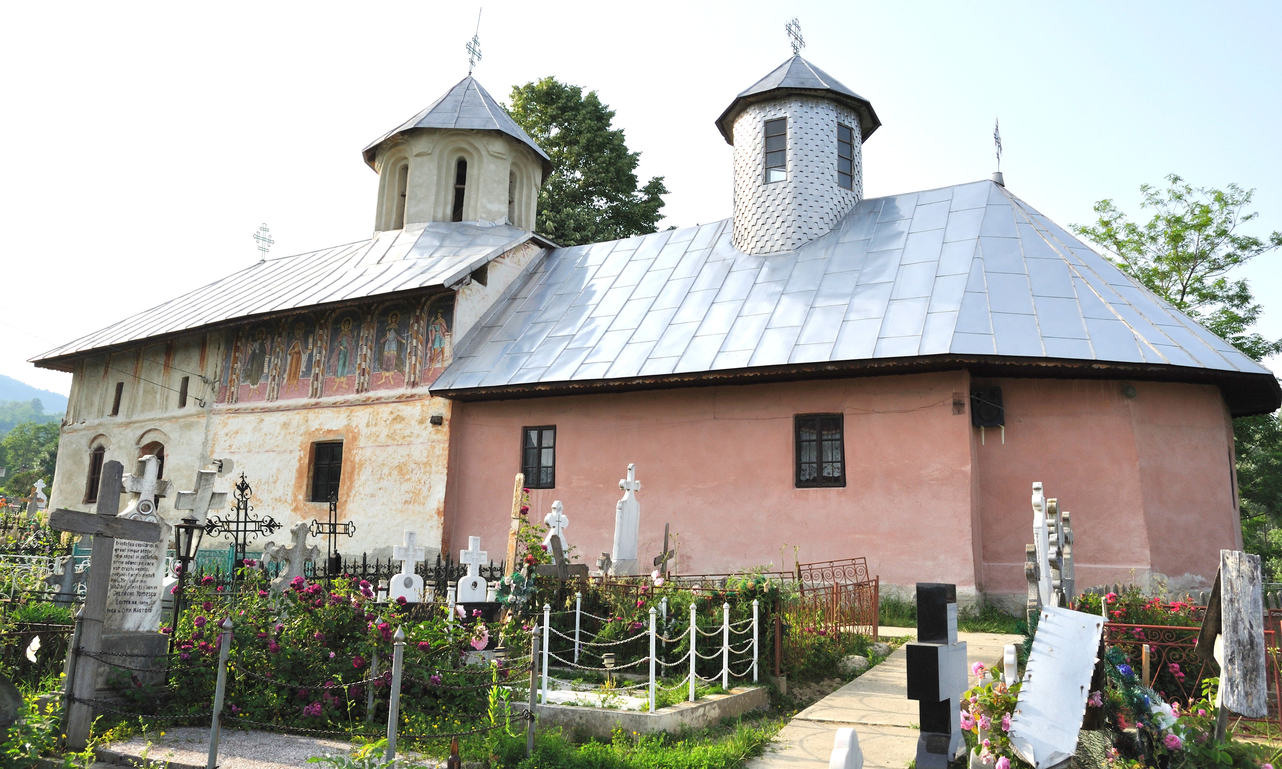 Biserica de lemn „Buna Vestire”, sat Bărbătești, cătun Iernaticu, Vâlcea